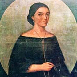 Imagen de Manuela Sáenz, patriota ecuatoriana.